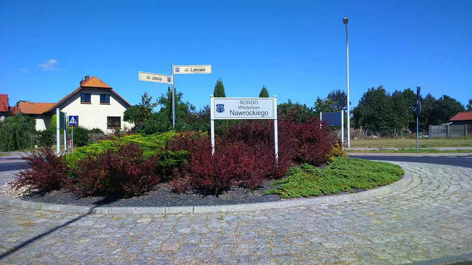 Rondo majora Władysława Nawrockiego (1891-1940) w Krotoszynie, kawalera Krzyża VM, wiceprzewodniczącego krotoszyńskiego gniazda TG Sokół, powstańca wielkopolskiego 1918/1919, bohatera bitew o Postawy i nad rzeką Autą, uczestnika kampanii wrześniowej 1939, zamordowanego w Katyniu (Rosja).